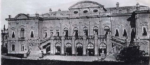 Ivnya Palace